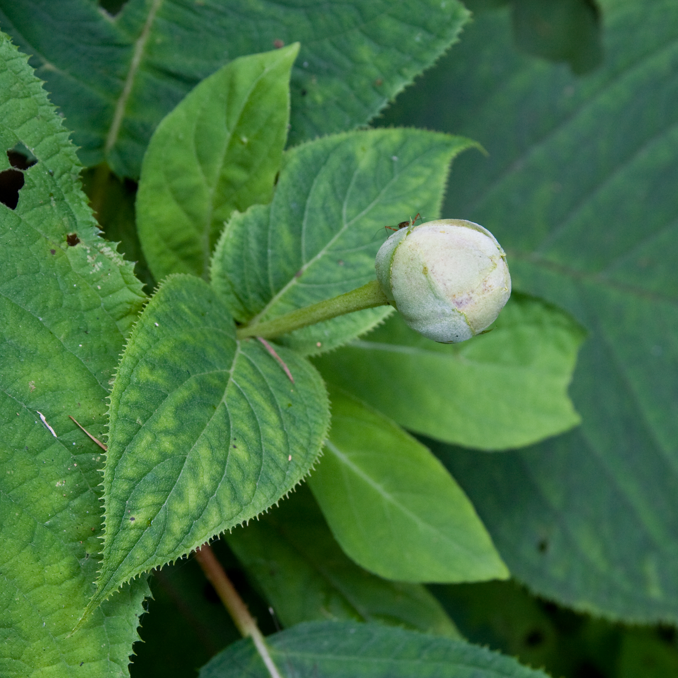 タマアジサイ (学名:Hydrangea involucrata)